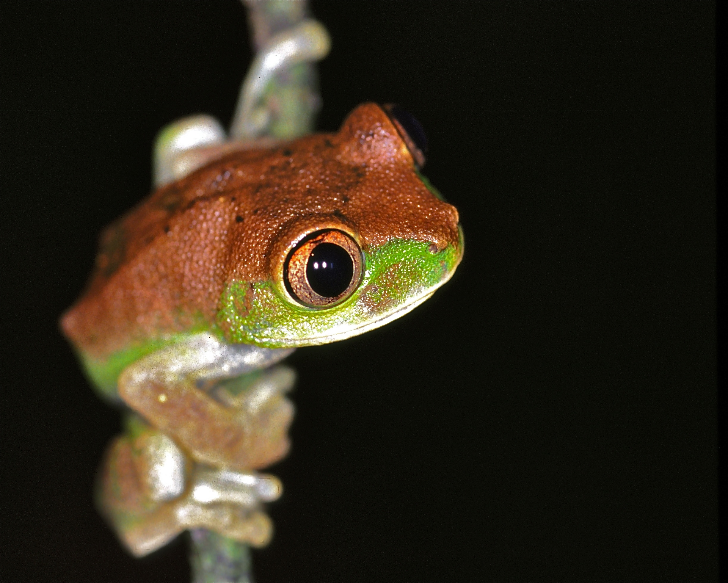 Korup NP, CAMEROON